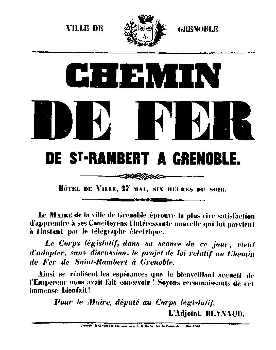 Affiche du 27 mai 1855 informant les grenoblois de l'arrivée du chemin de fer à Grenoble pour l'année 1858.